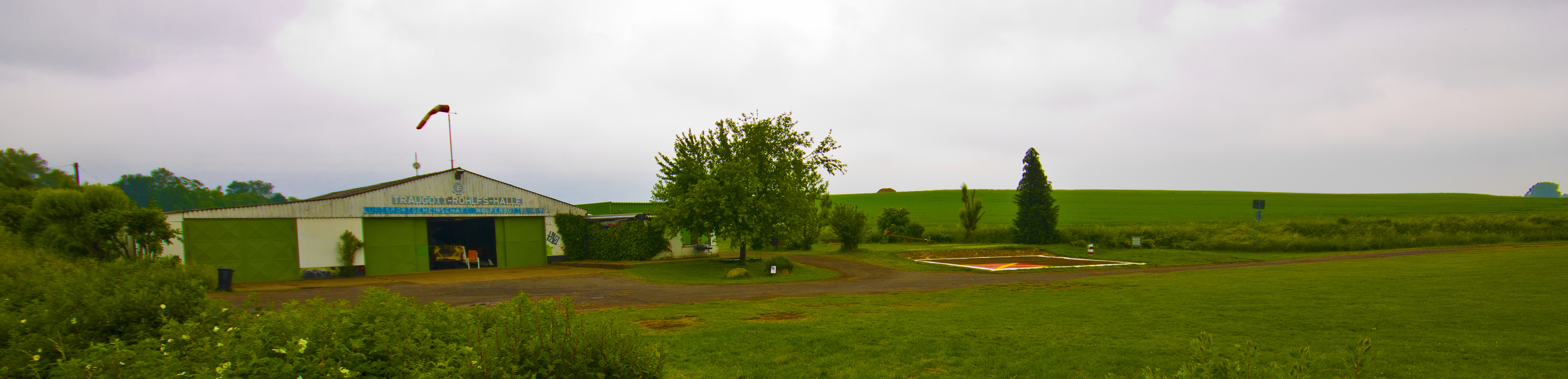 Segelflugplatz im Stadtteil Linden